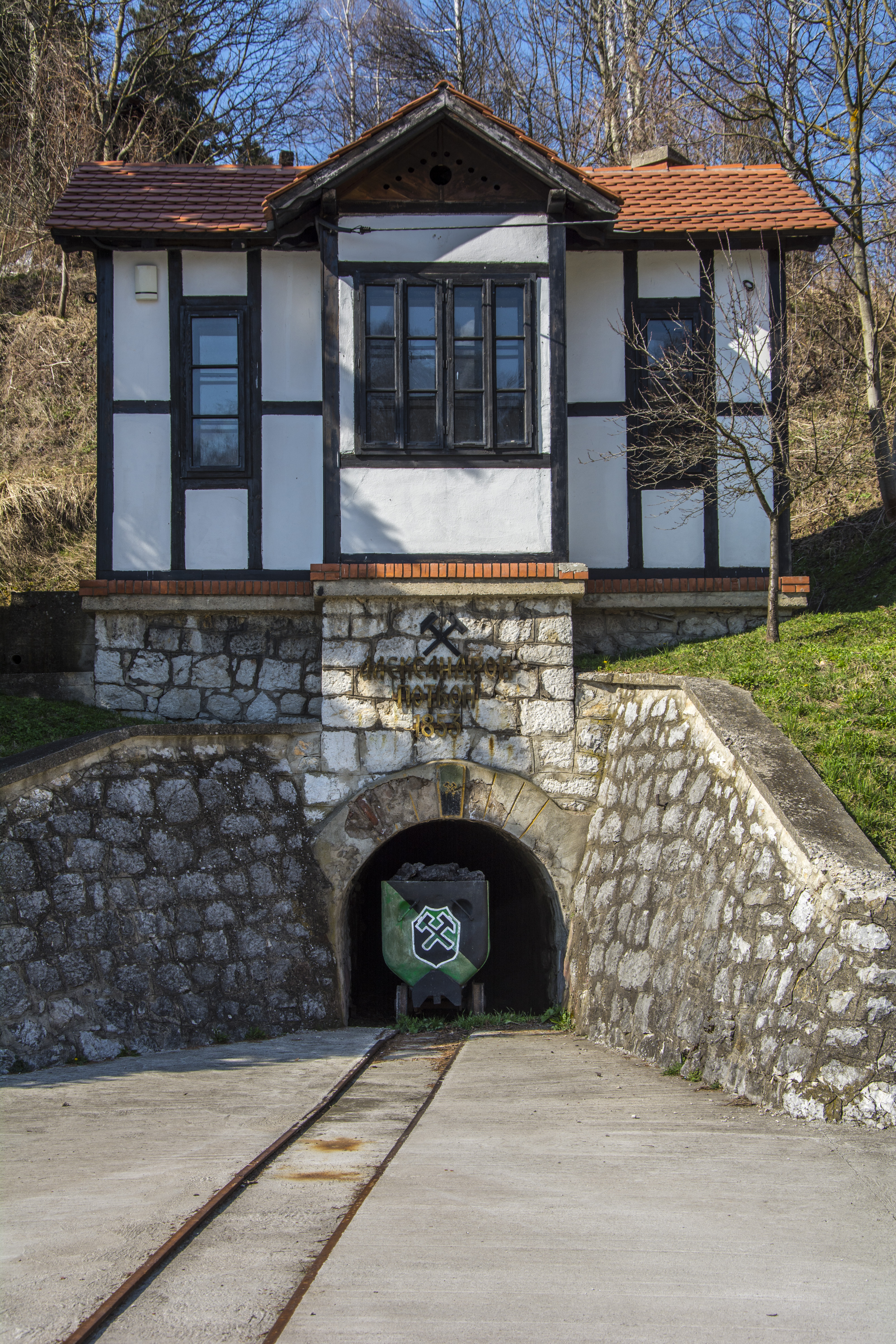 Поставка експоната, Александров поткоп, један од најстаријих у Србији